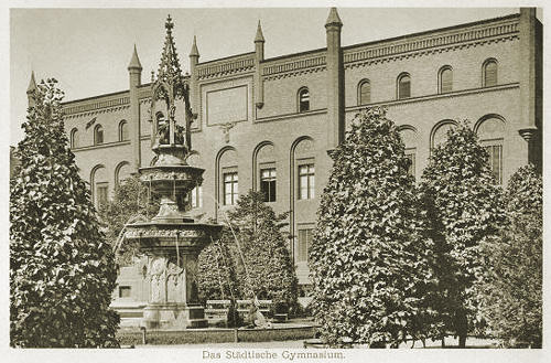 Stare Przedmieście w Gdańsku, na pierwszym planie Targ Maślany i nieistniejąca fontanna, dalej budynek przy ul. Lastadia 2.